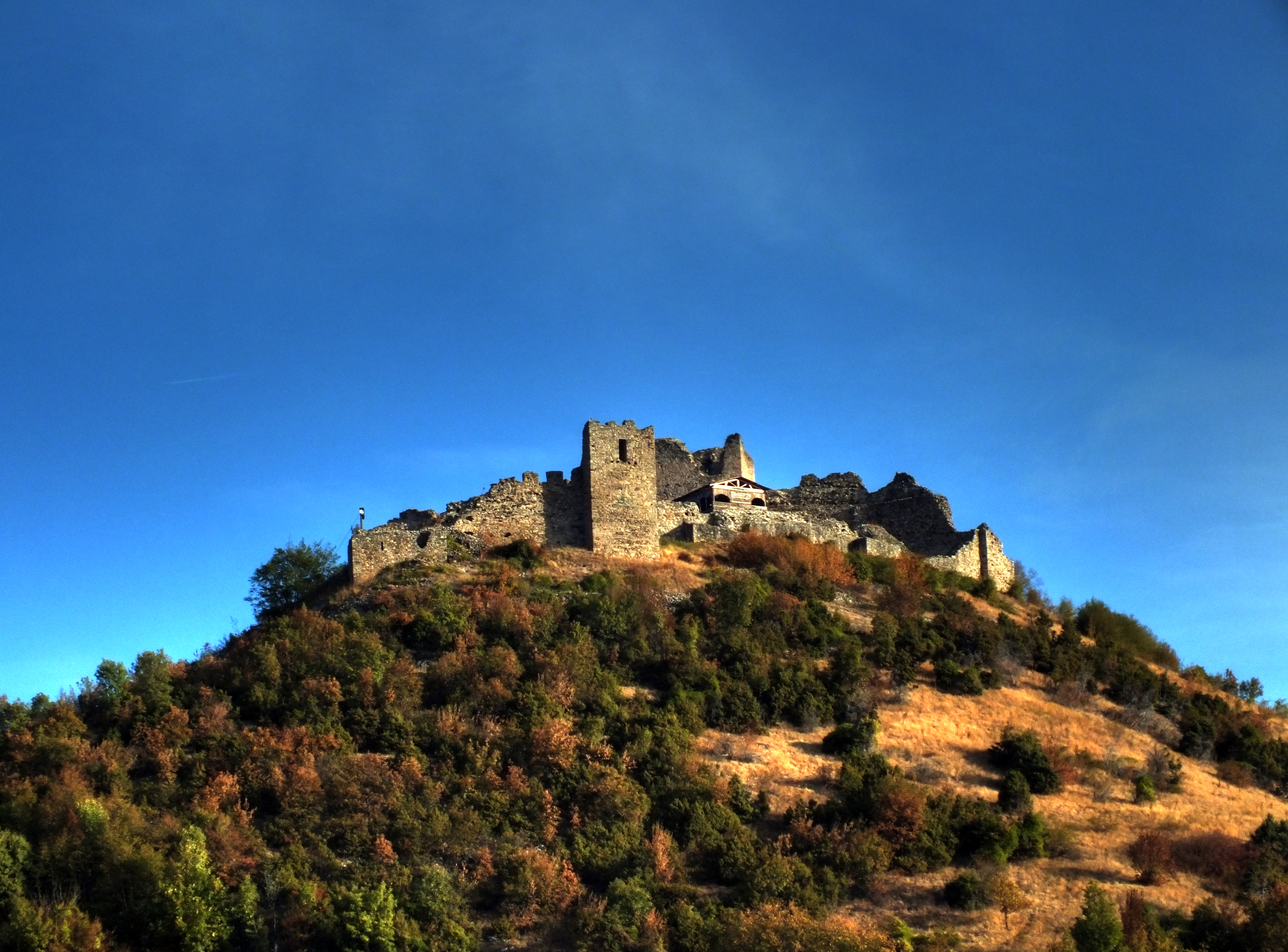 Srednjevekovni grad Koznik nadomak Brusa u poslednje vreme dobija veći značaj. U avgustu mesecu se odigravaju viteške igre i razne druge manifestacije. Prelepa priroda koja okružuje građevinu upotpunjava mističnu atmosferu naročito u jutarnjim satima